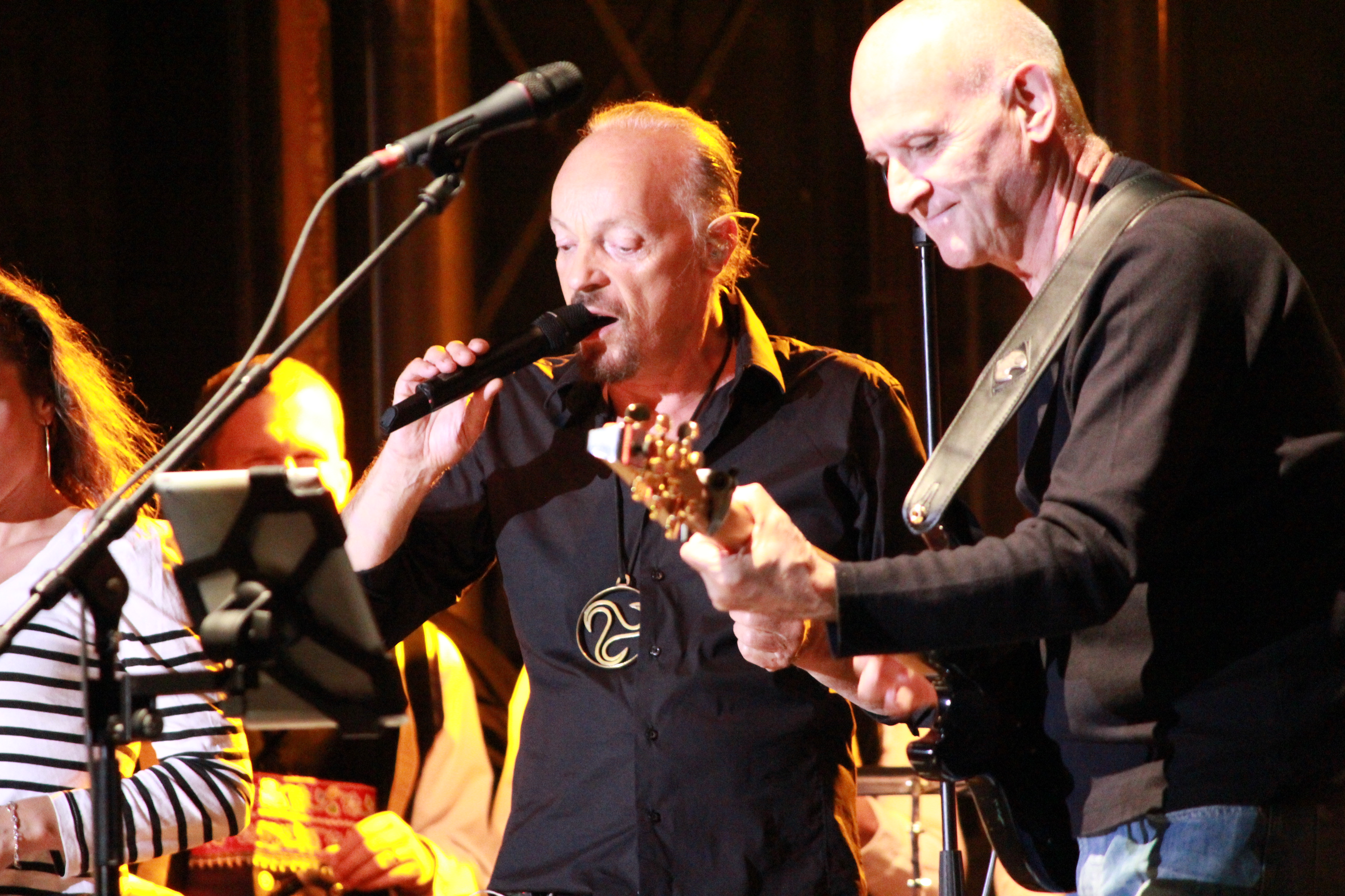 Dan Ar Braz et Alan Stivell lors de son concert inaugural de la tournée liée à la promotion de l'album Celebration, lors du Festival Interceltique de Lorient 2012.